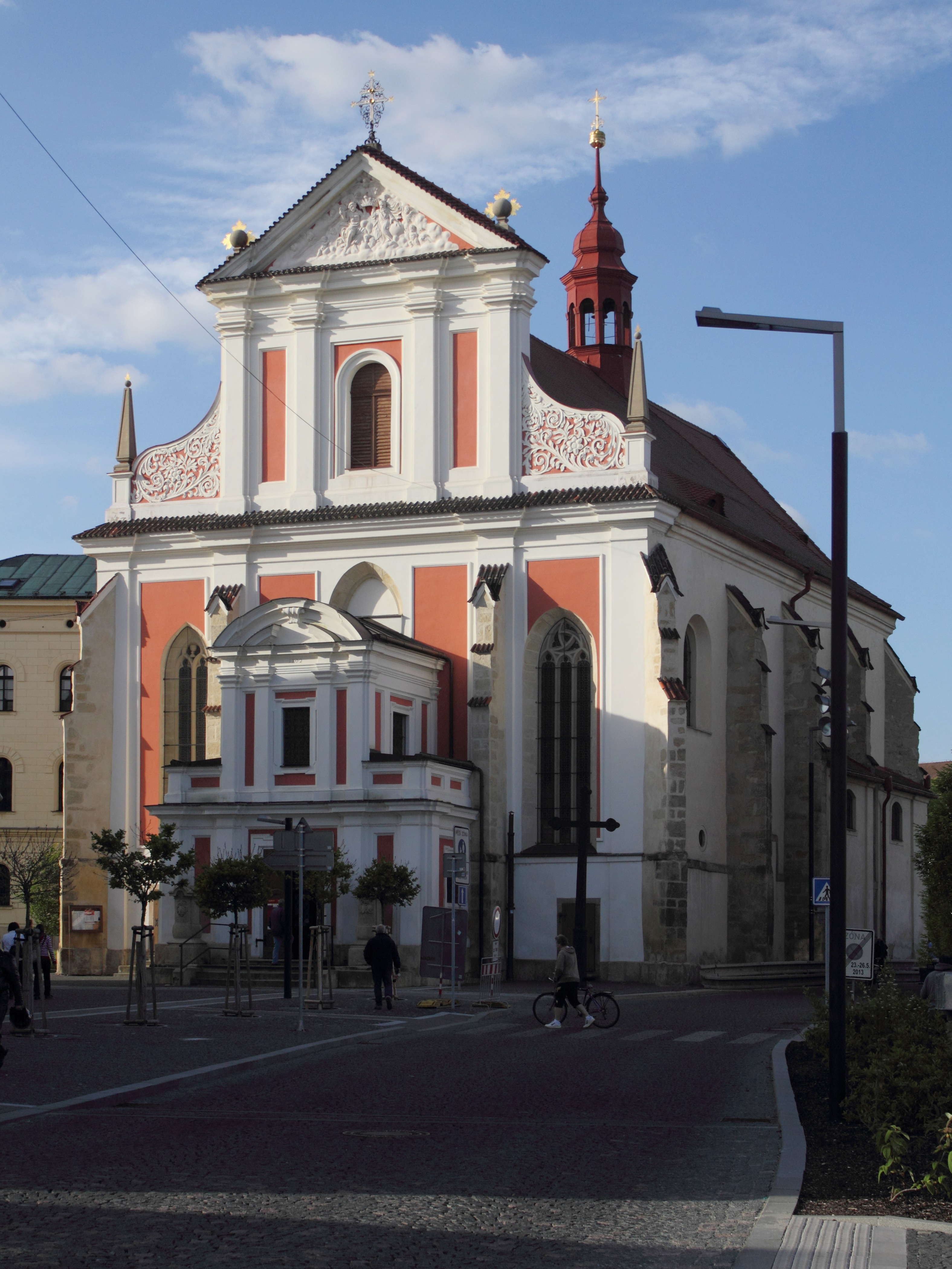 Kostel Nanebevzetí Panny Marie v Mladé Boleslavi